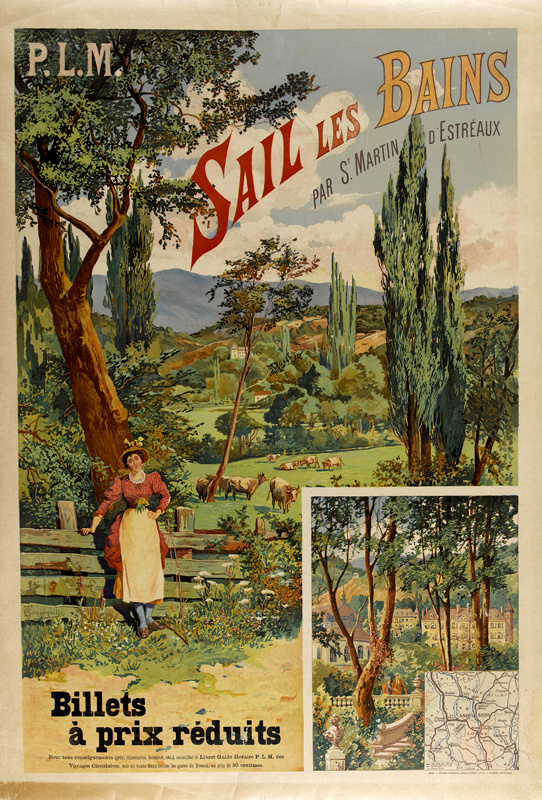 "Sail les Bains". Farblithografie, 112,5 x 78 cm